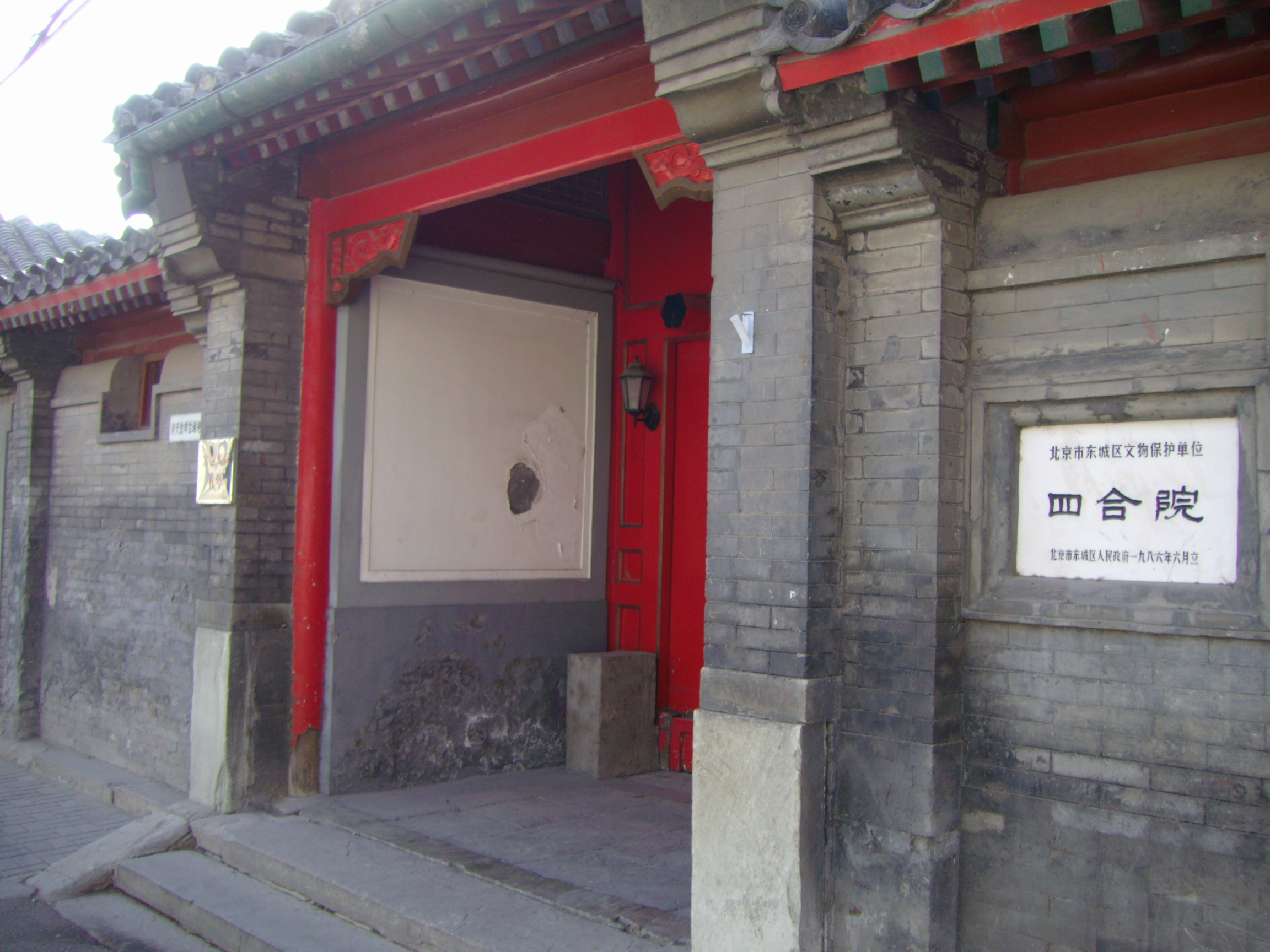 中文（中国大陆）: 北京王府井大街附近的富强胡同6号四合院